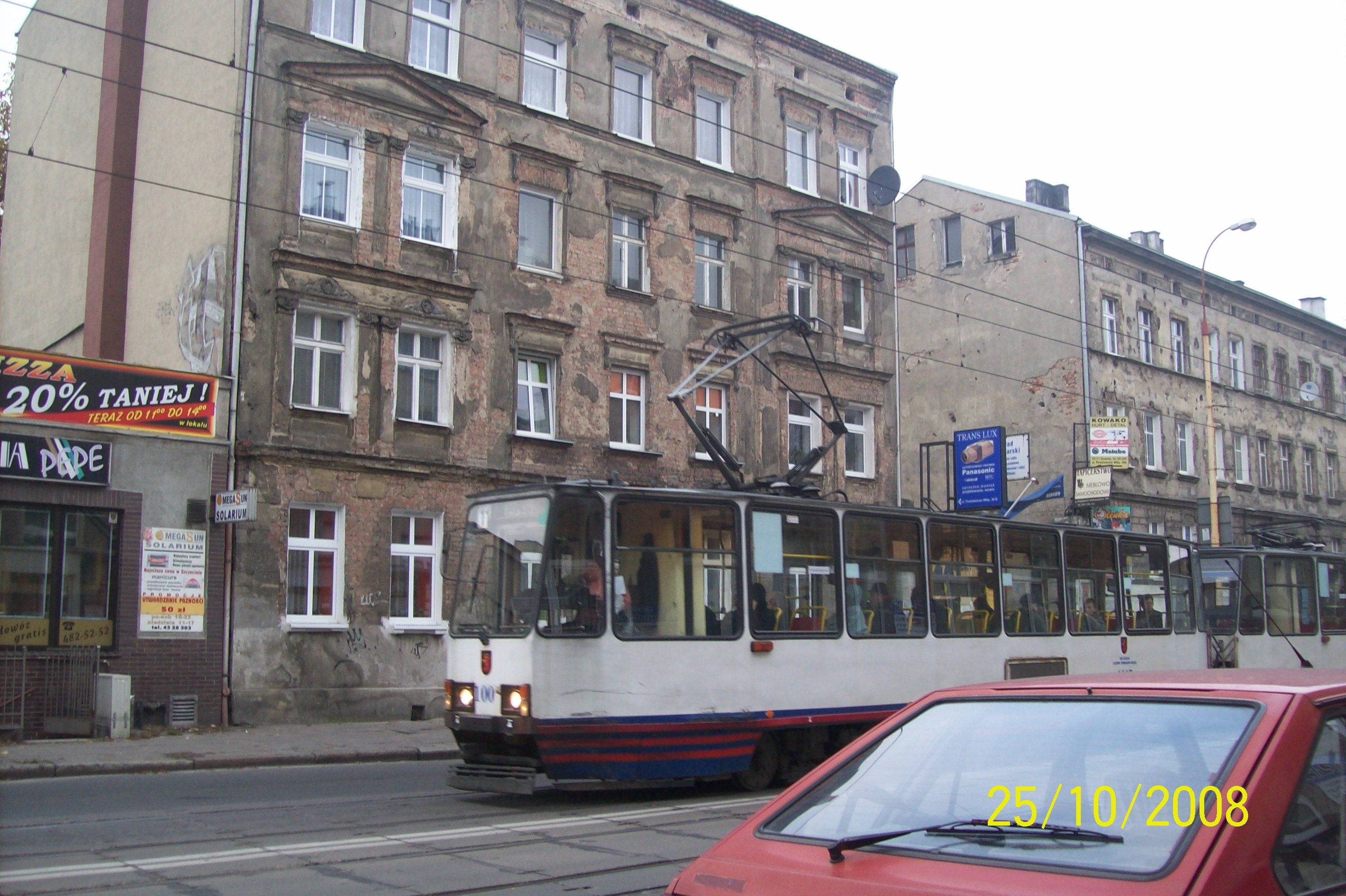 Tramwaj MZK Szczecin w 2008